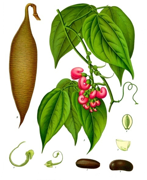 Kalabarbohne. A blühender Zweig in natürl. Grösse; B Fruchthülse, desgl.; 1 Blüthe ohne Krone, im Längsschnitt, desgl.; 2 Griffel mit Narbe, vergrössert; 3 u. 4 Same (Bohne) von verschiedenen Seiten, natürl. Grösse; 5 unterer Theil der Samenlappen mit Würzelchen, desgl.; 6 Same im Querschnitt, desgl.